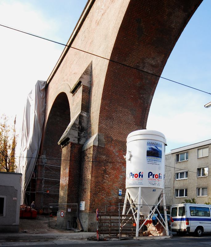 Der Aquädukt Mauer über die Endresstraße in Wien-Liesing während der Generalssanierung.